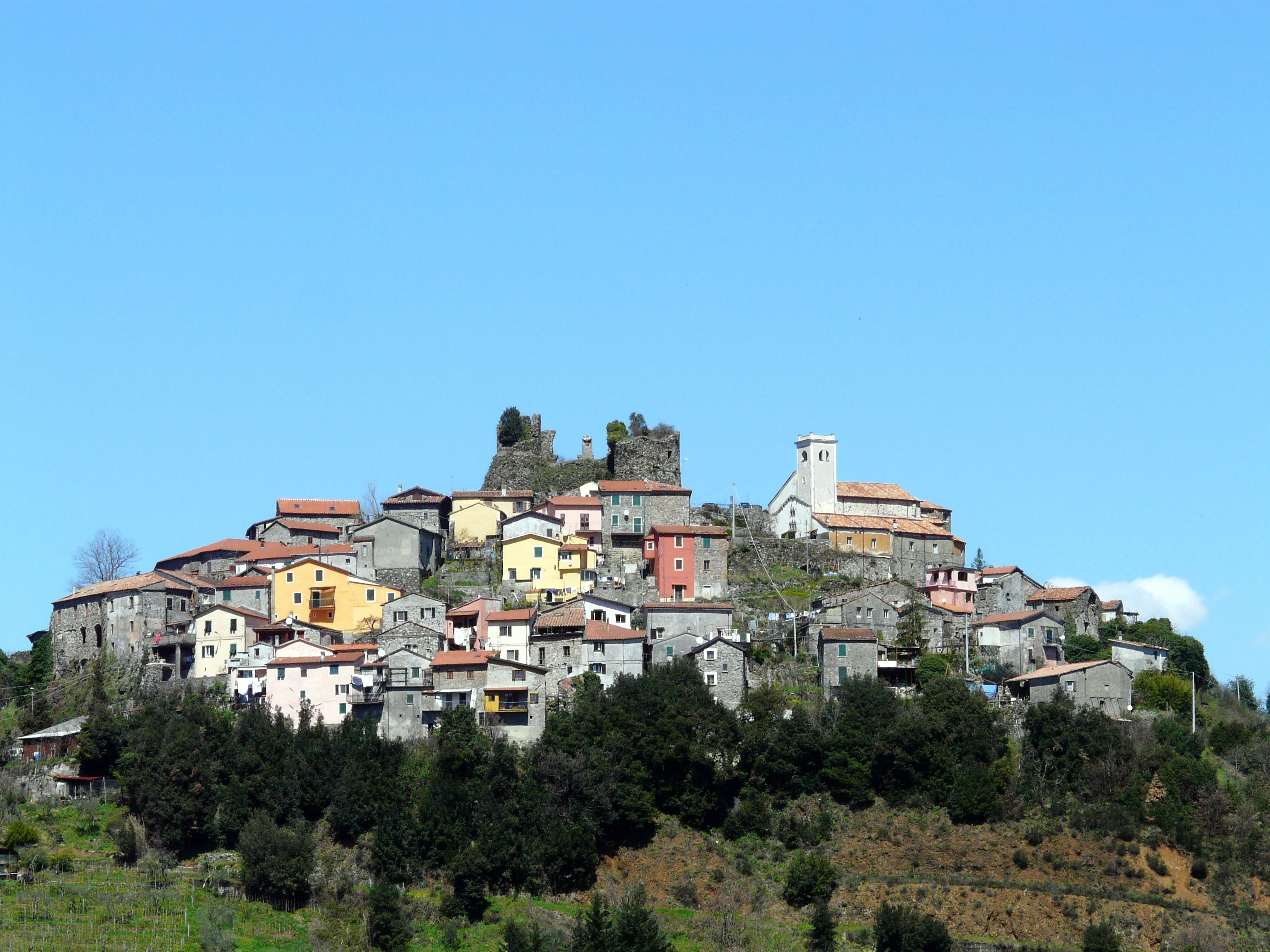 Panorama da Vecchietto di Bibola, Aulla, Toscana, Italia